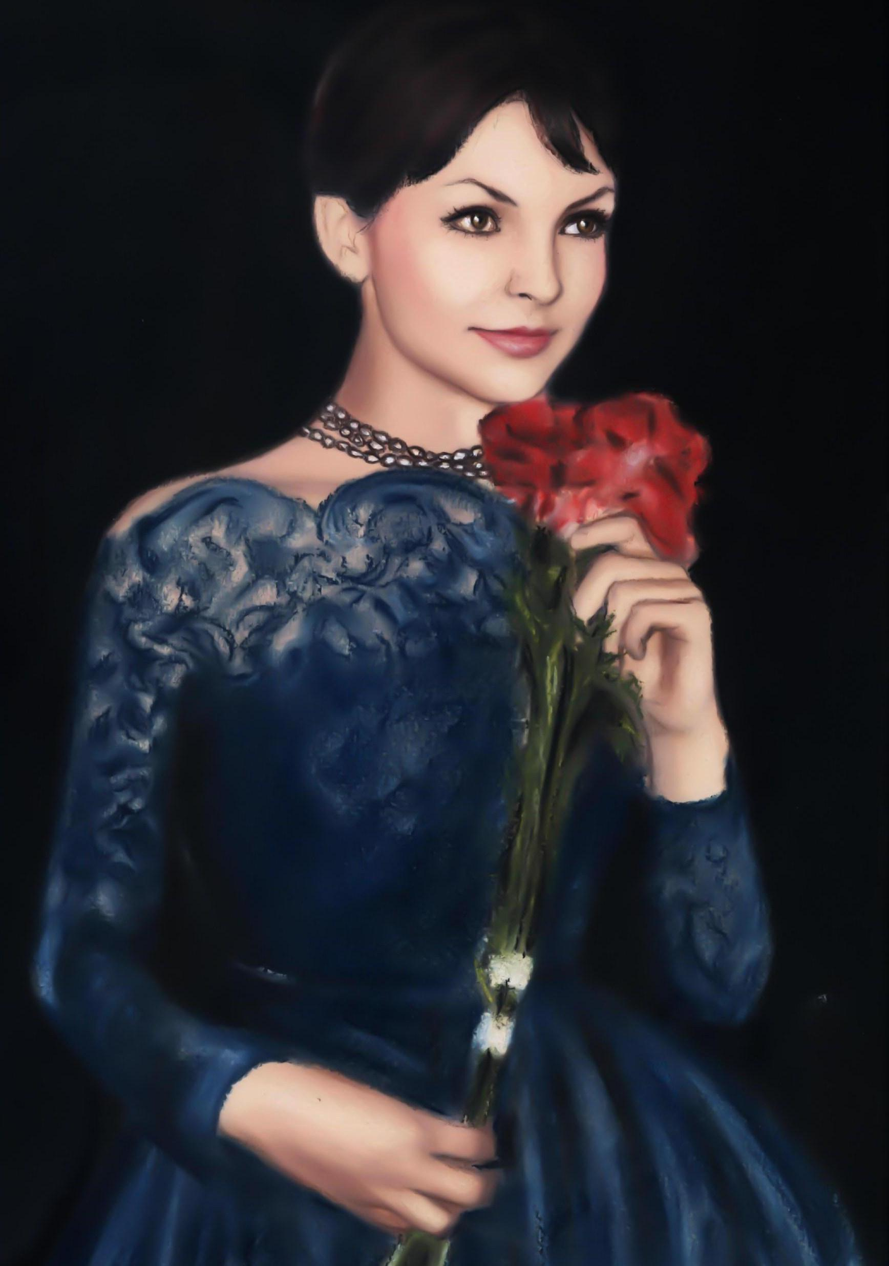 Teresa Tuszynska